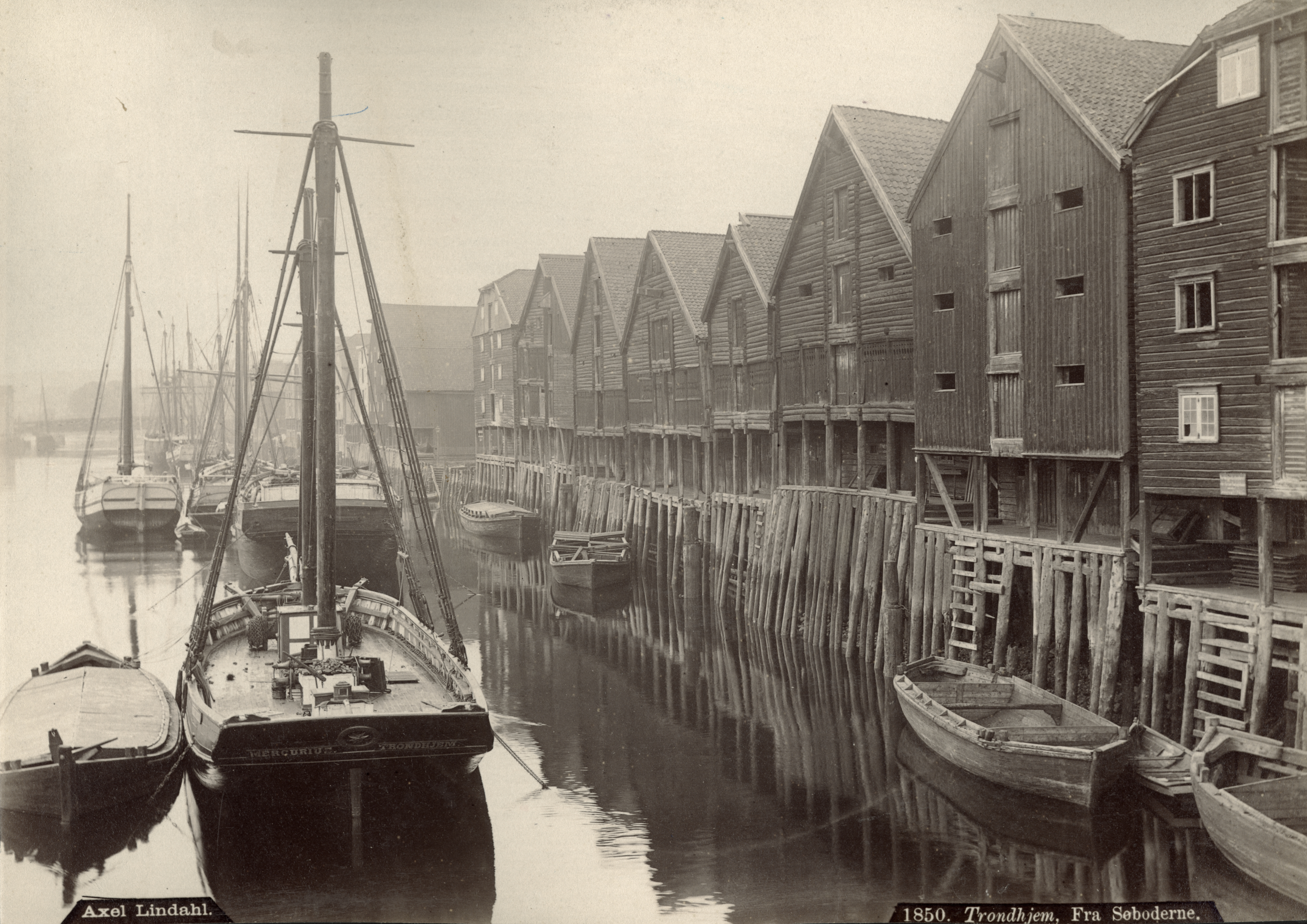 Sjøbodene vis-à-vis Bakklandet, Bryggerekkene vis-à-vis Bakkland i Trondheim, Sør-Trøndelag «Et morsomt bilde fra Nidelven ovenfor Bakke bro litt før aarhundreskiftet. Det var enda jakter og jægter i bruk som transportfartøier til sjøss. Bildet er et av de 500 morsomme bilder i Minneboken om Trondhjem»